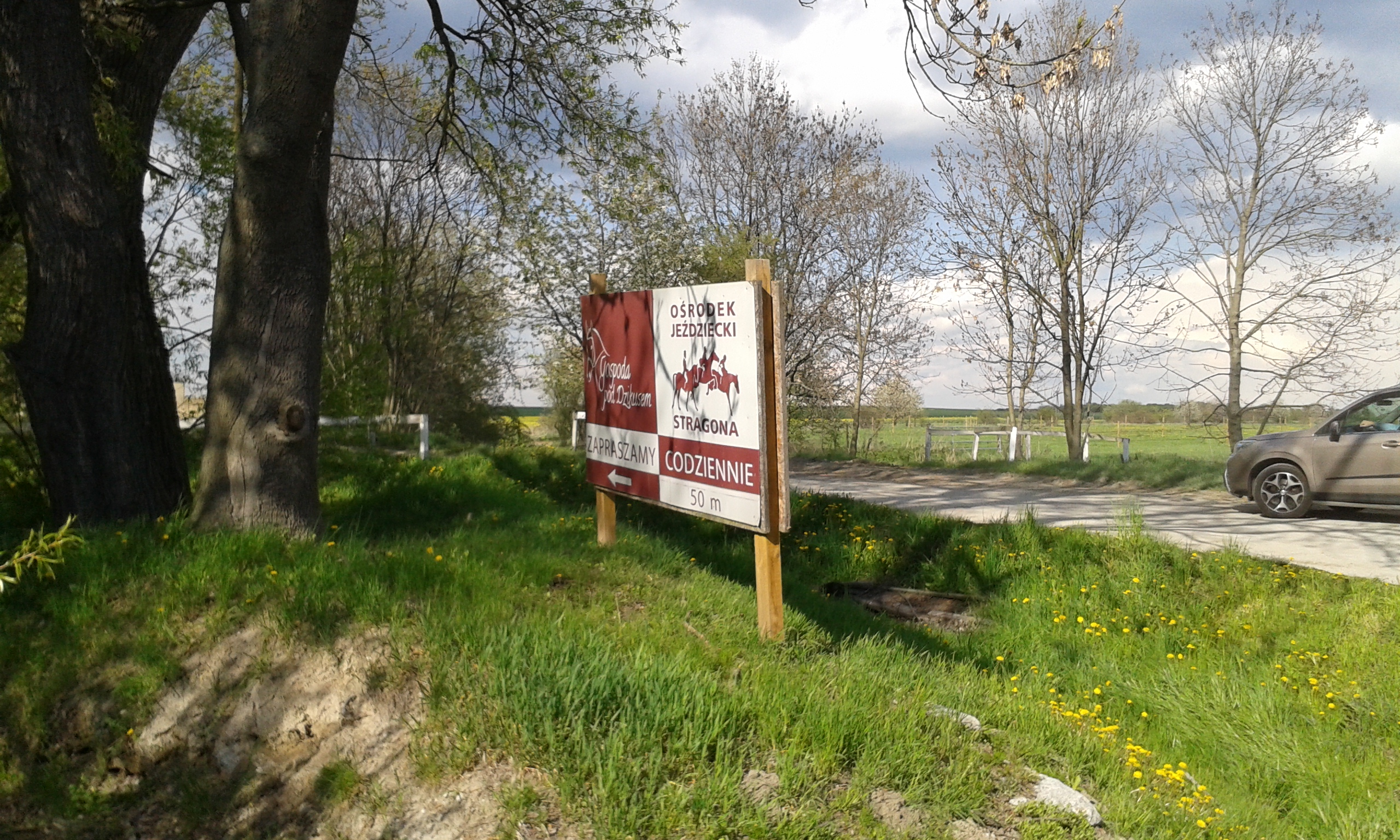 Widok na tablicę ośrodka jeździeckiego.